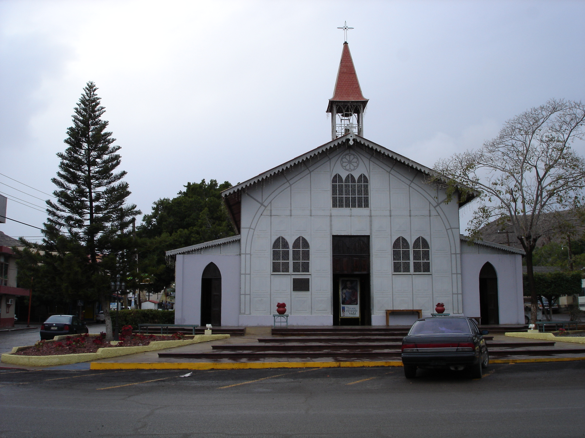 Templo de Santa Barbara. Vista de día. Obra del Arq. Alexandre Gustave Eiffel.